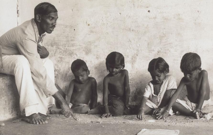 ആശാൻ അക്ഷരങ്ങൾ മണ്ണിലെഴുതി പഠിപ്പിക്കുന്നു.